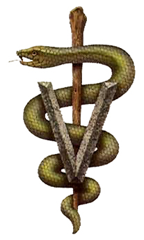 O Símbolo da Medicina Veterinária. Onde se vê o bastão que significa o segredo da vida terrena, poder da ressureição, o auxílio e o suporte da dassistência dada pelo médico aos pacientes. A letra "V" tem a função de identificar a medicina Veterinária e diferenciar das outras profissões biomédicas. A serpente representa a prudência, a vigilância, a sabedoria, a vitalidade e o poder de regenerescência e preservação da saúde. Tudo isso dentro de um losango.